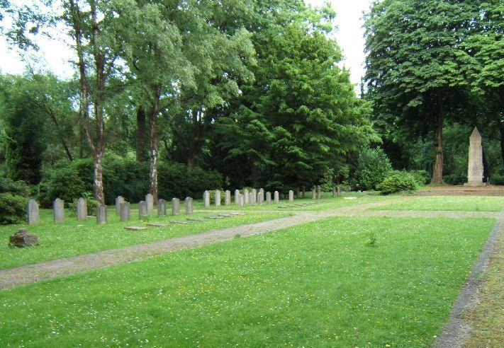 Gräberfeld mit Obelisk